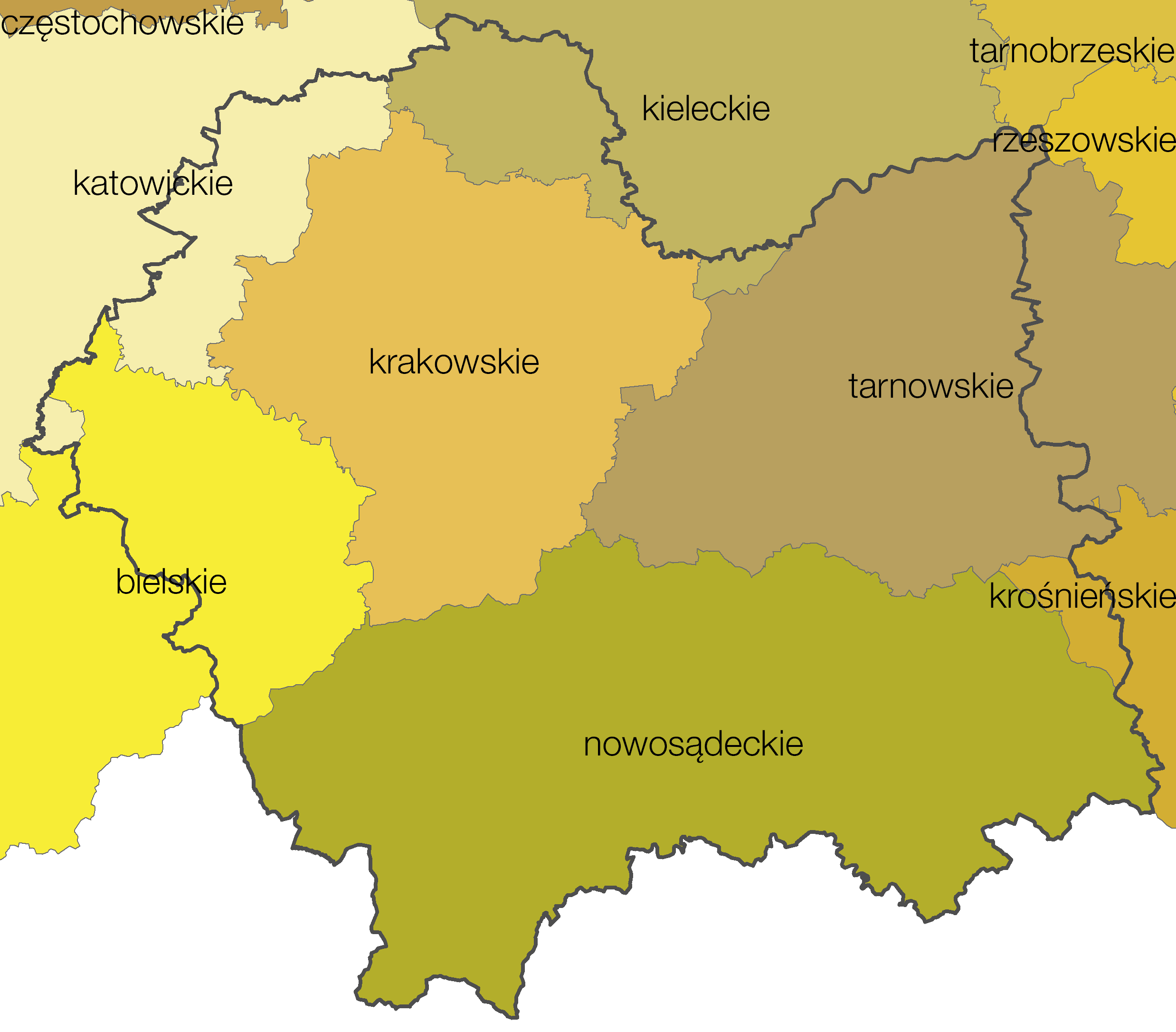 Województwo małopolskie (od 1999) jako powstałe z województw podziału administracyjnego Polski z lat 1975-1998